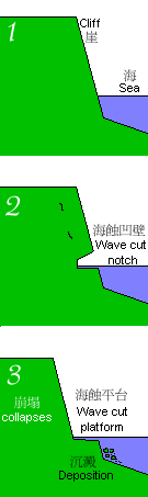 譯自英文版:en:Wave_cut_platform.png，原圖亦為GFDL